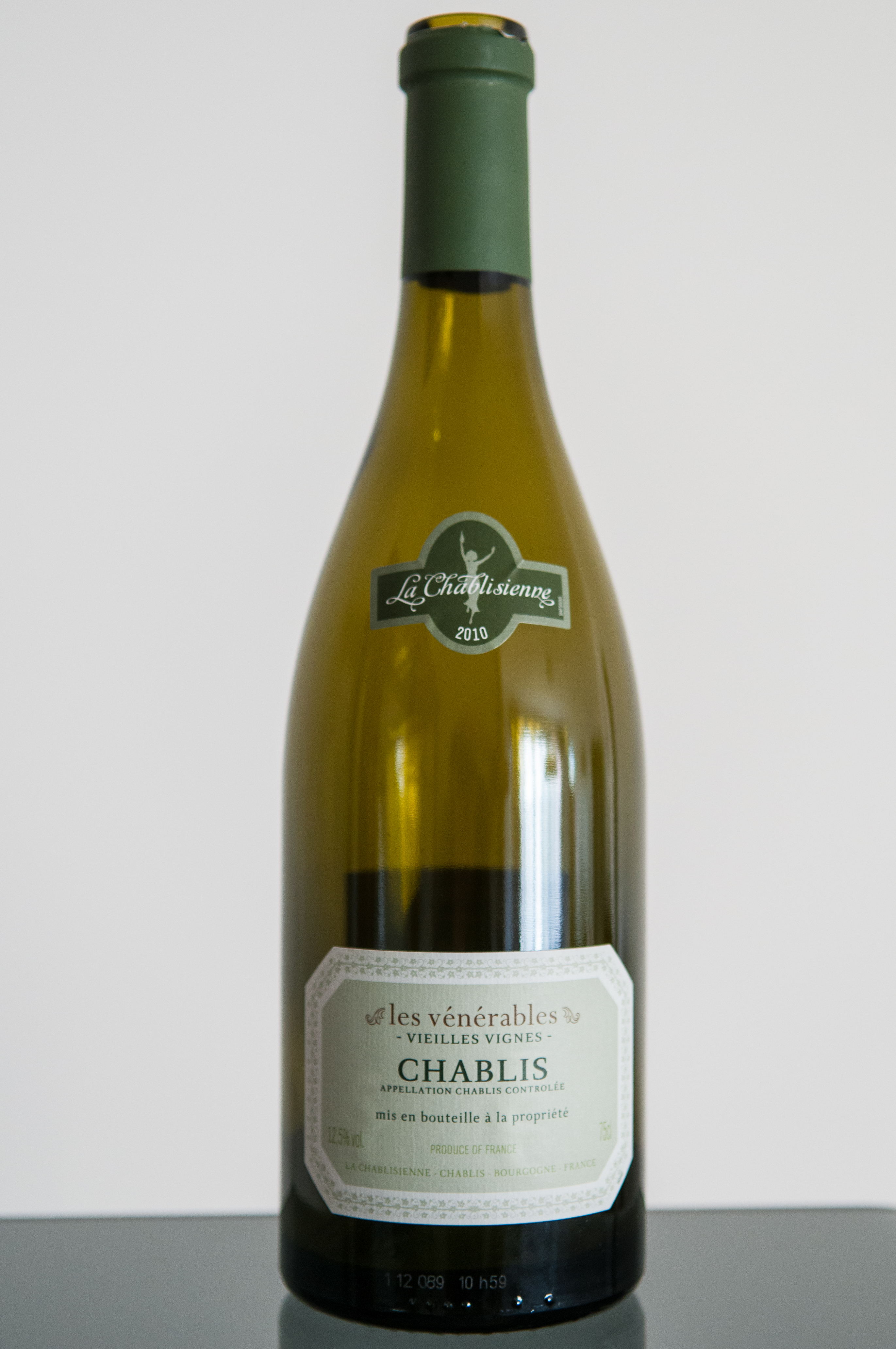 2010 La Chablisienne Chablis "Les Vénérables" Vieilles Vignes